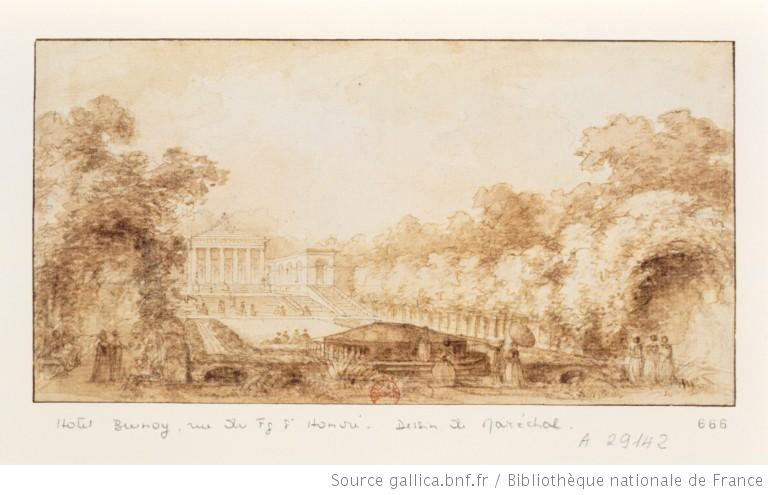 L'hôtel de Brunoy, construit par Etienne-Louis Boulée. Dessin à la plume et lavis à l'encre brune ; 10,9 x 21 cm. Paris, Bibliothèque nationale de France, fonds Destailleur. Référence bibliographique : Destailleur Paris, t. 4, 666